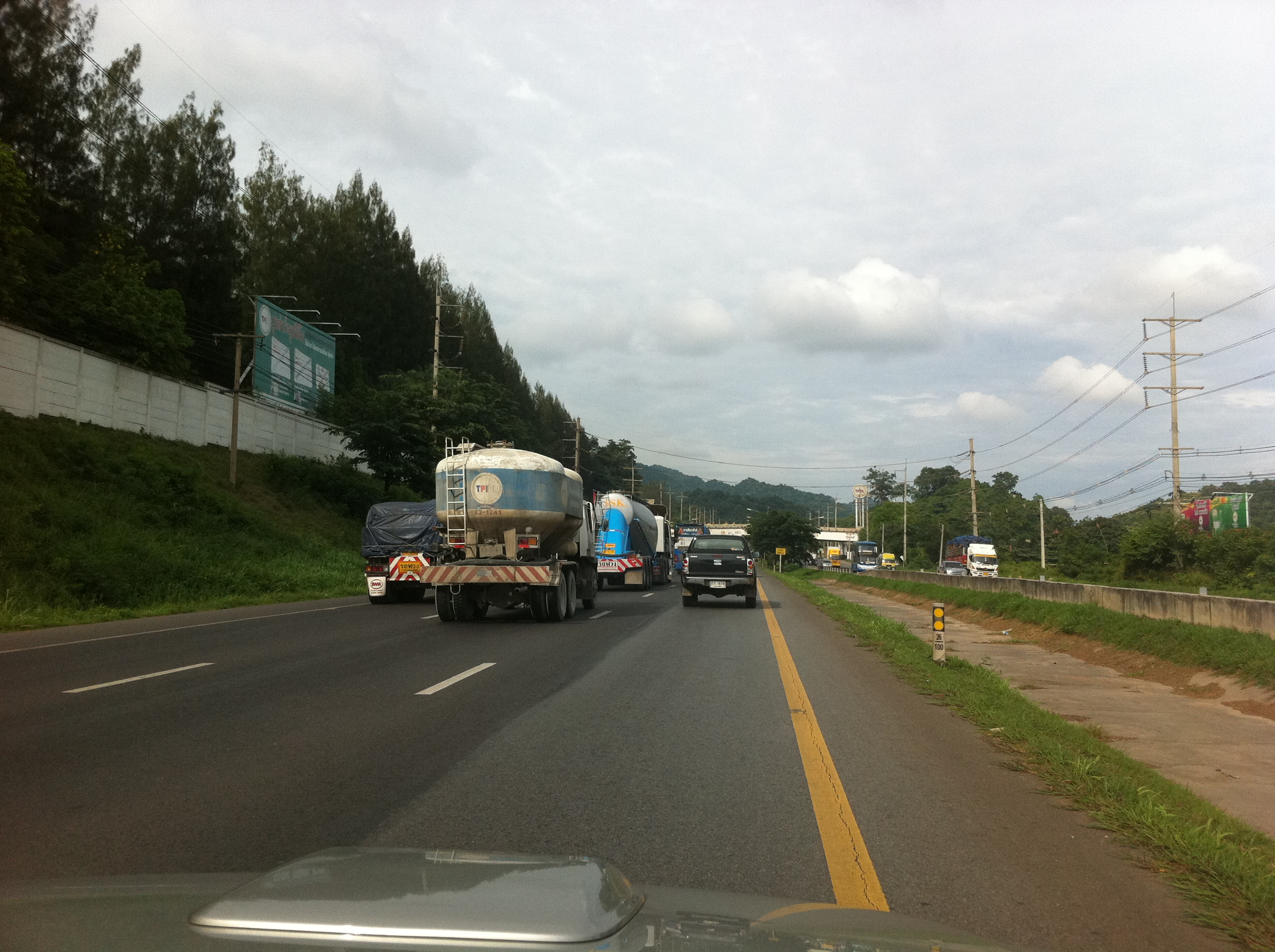 ถนนมิตรภาพ แถวสระบุรี